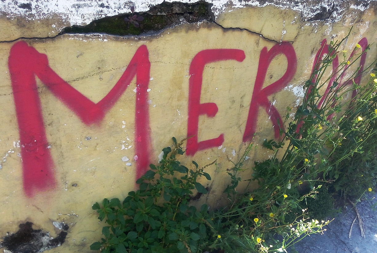 "Merda"; graffito a Torino in via Giulio, 21 giugno 2016